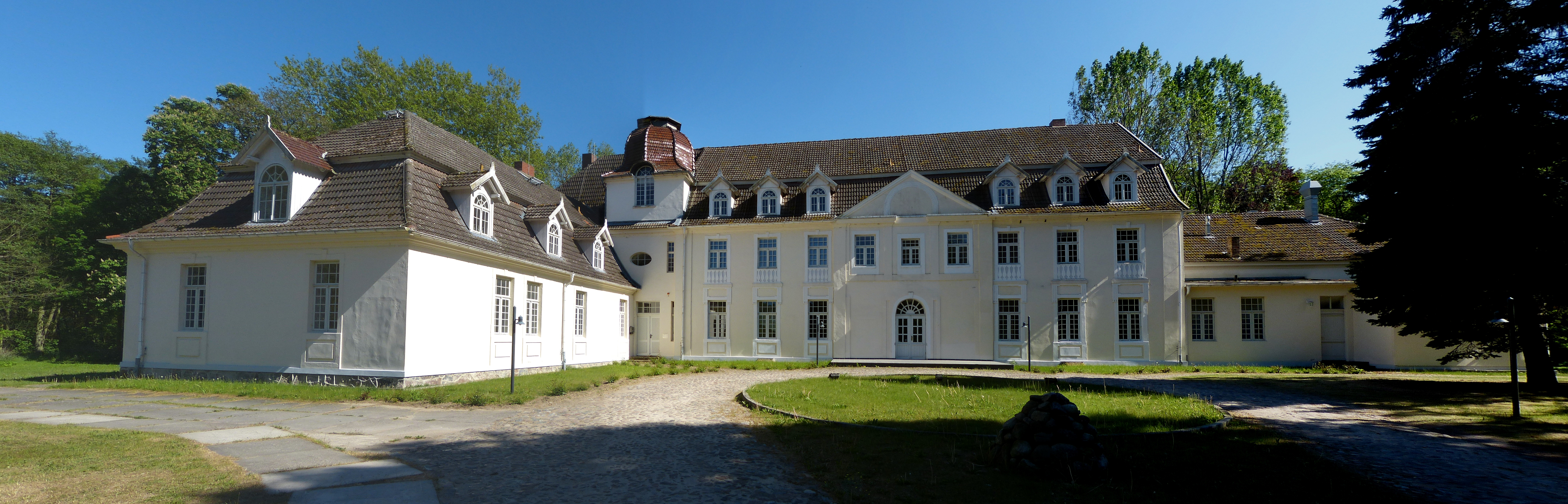 Herrenhaus Buggenhagen, Hofseite, Ansicht von Norden